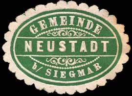 Sealing stamp Title: Gemeinde Neustadt bei Siegmar Description: grün, weiß, geprägt Place: Neustadt size: 3x4 cm